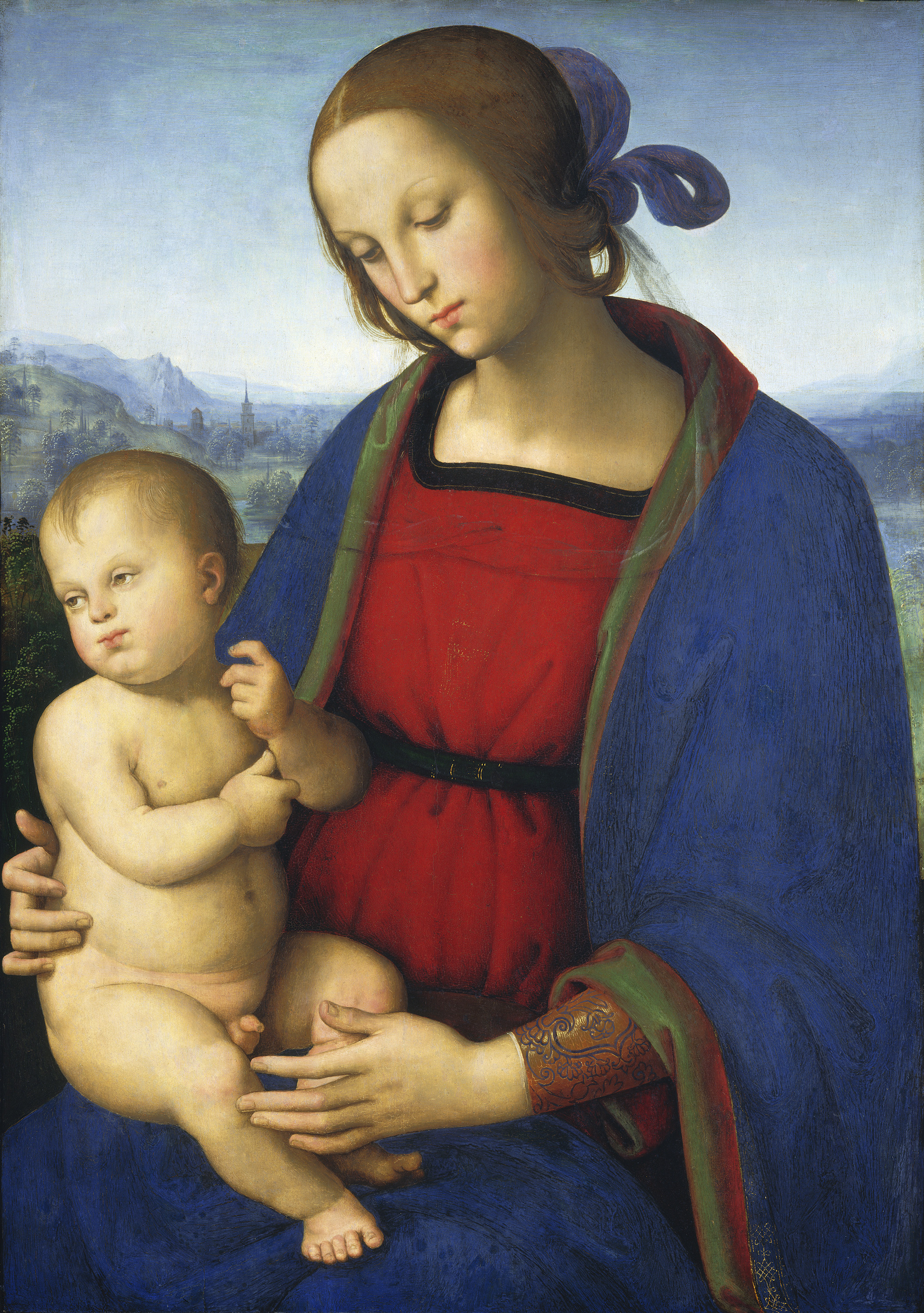 Pietro Perugino: Madonna col Bambino. Cat. no. 61 in Vittoria Garibaldi: Perugino. Catalogo completo. Octavo, Firenze 2000, ISBN 88-8030-091-1